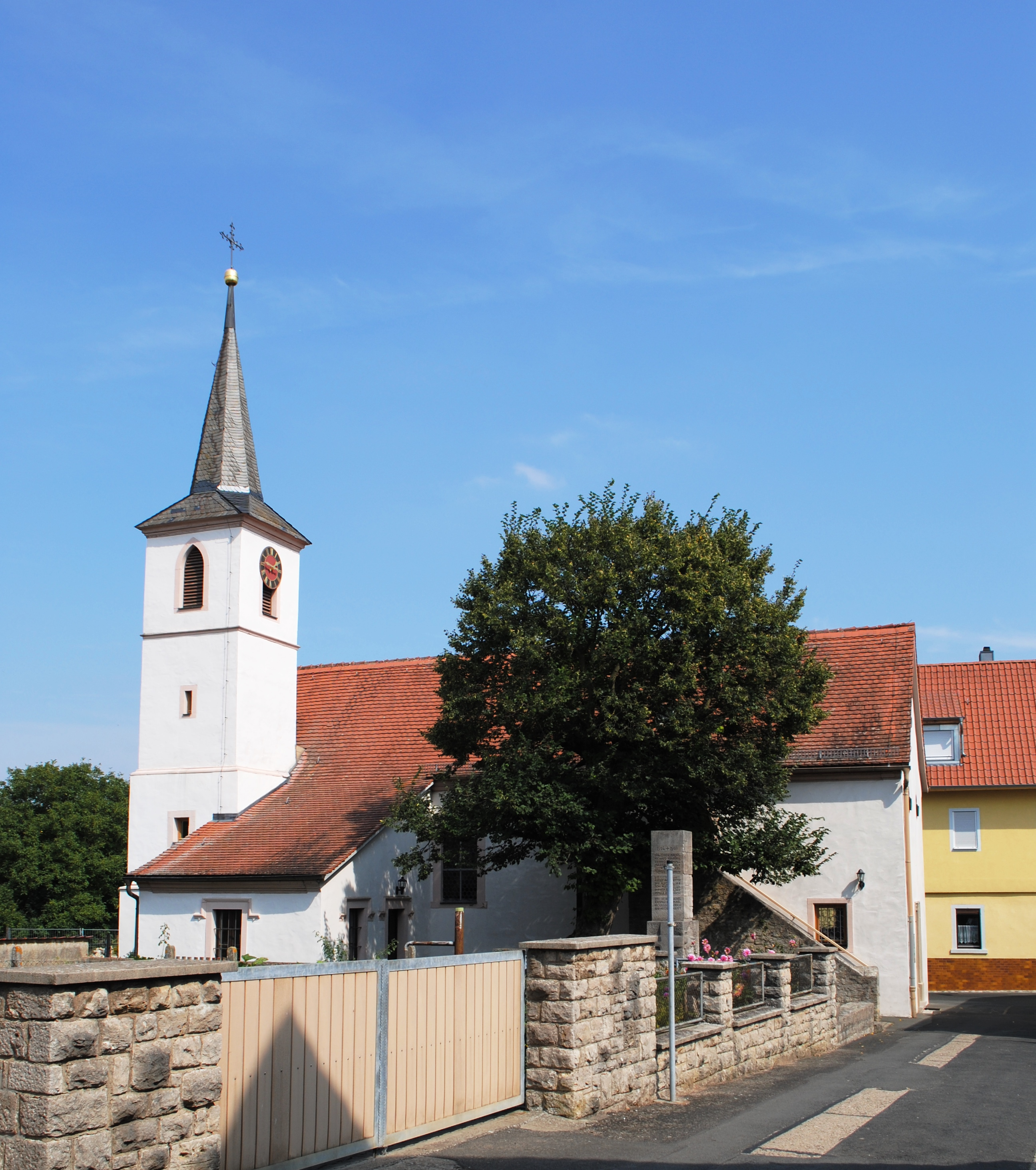 Kirche, NeusetzThis is a photograph of an architectural monument.